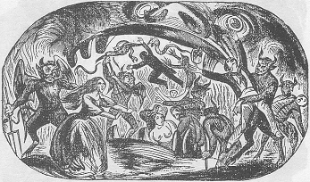 Imatge treta de la capçalera d'un romanç vuit-centista de manera que els drets d'autor han d'haver expirat